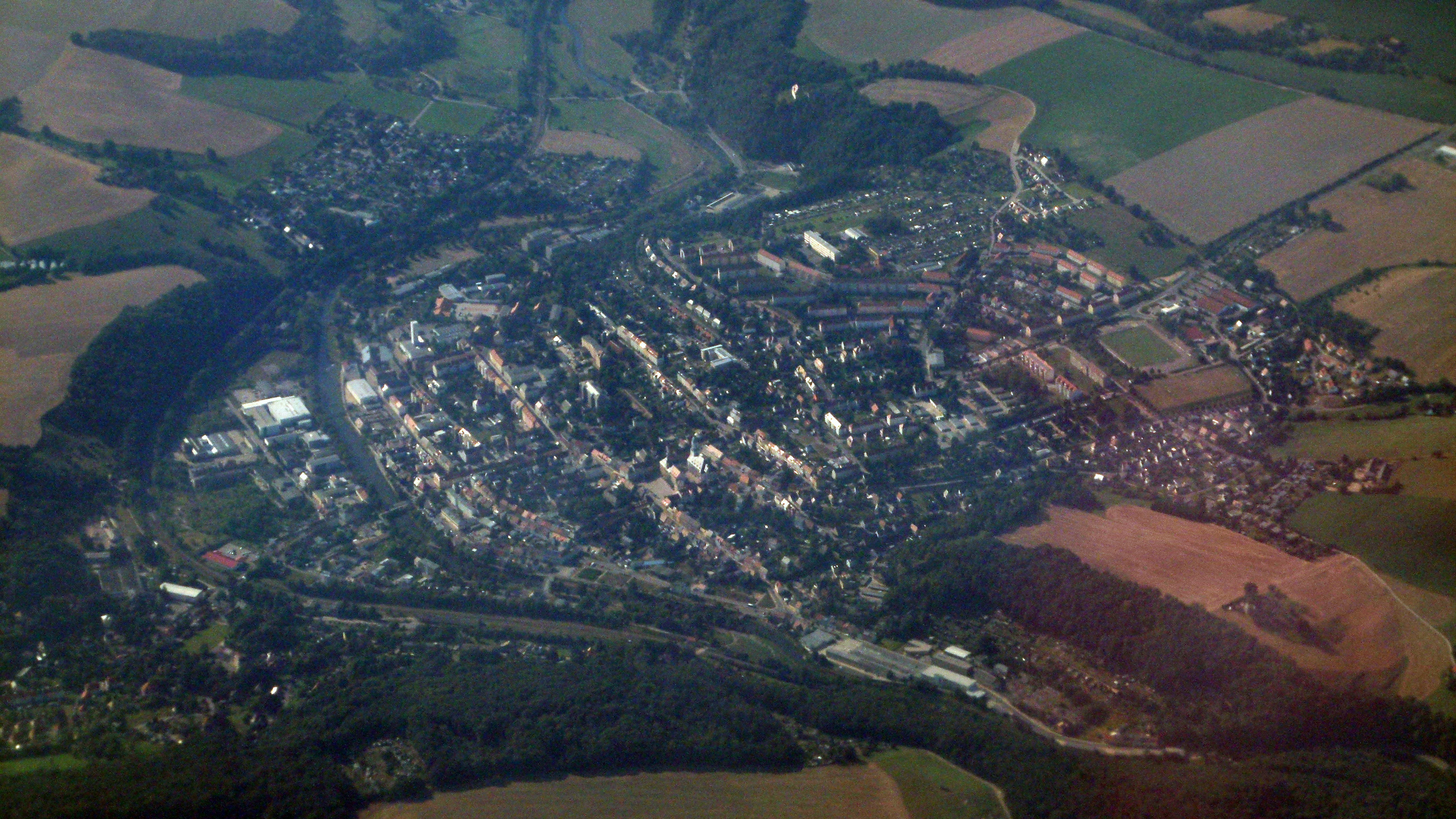 Blick auf Roßwein (Sachsen) aus der Luft